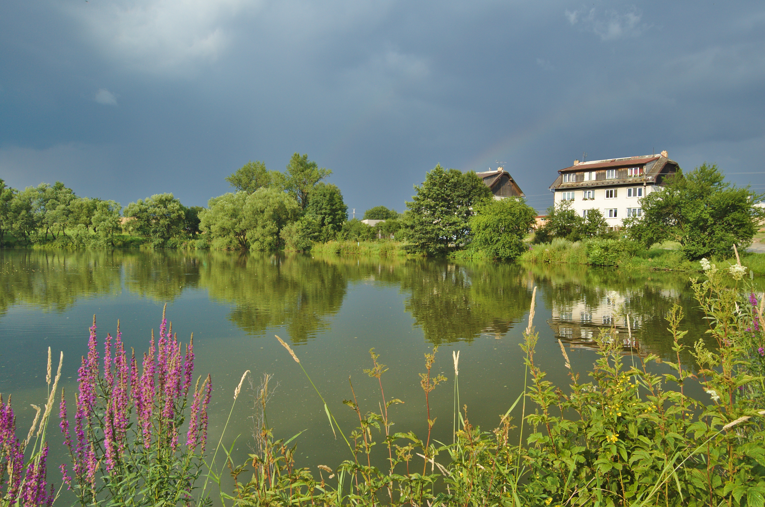 Horní rybník, Niva, okres Prostějov